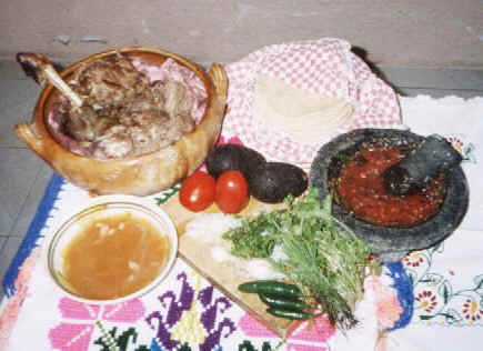 La Barbacoa de borrego, gastronomia representativa de Tezontepec de Aldama